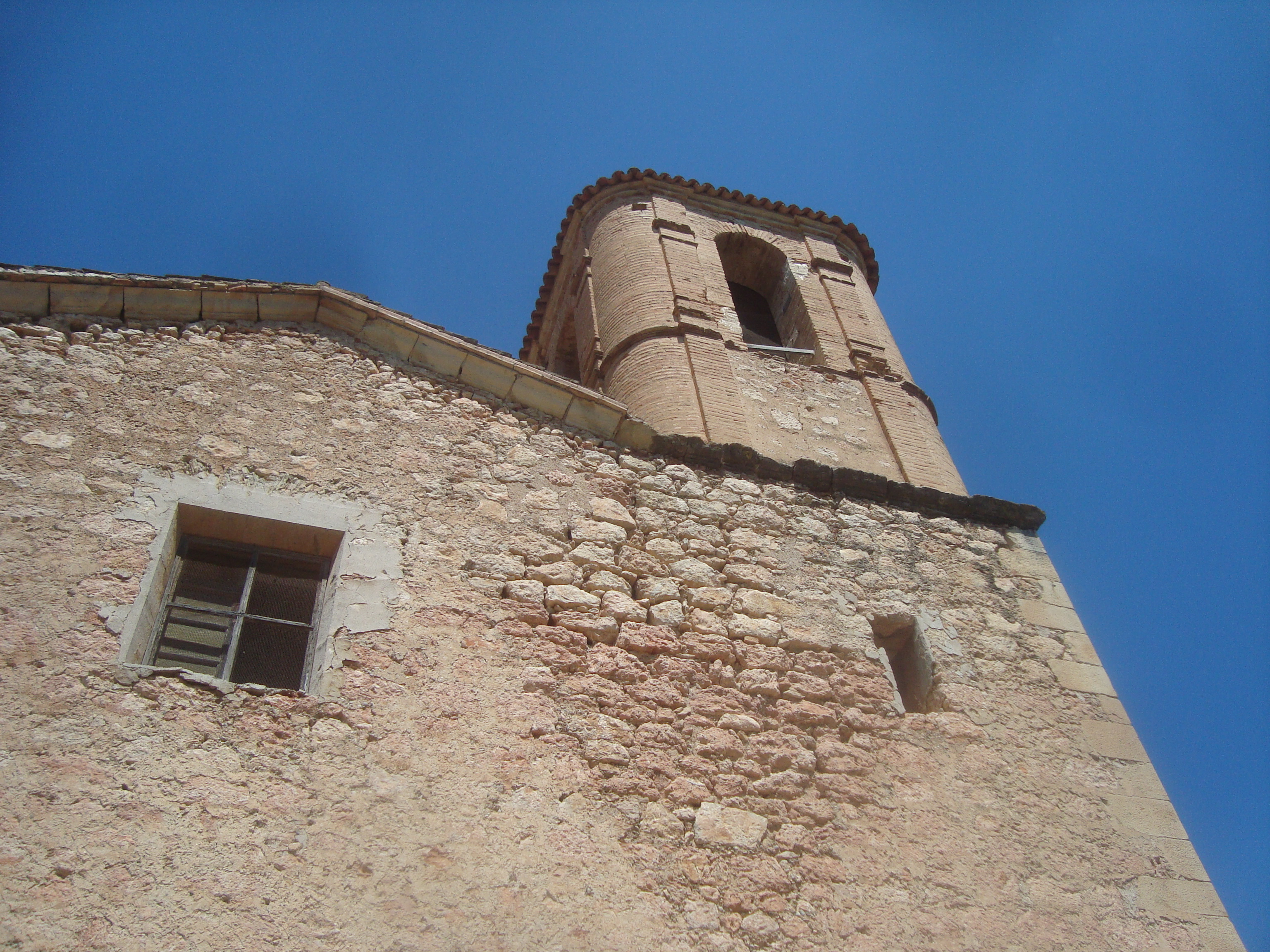 Església vella de Miravet